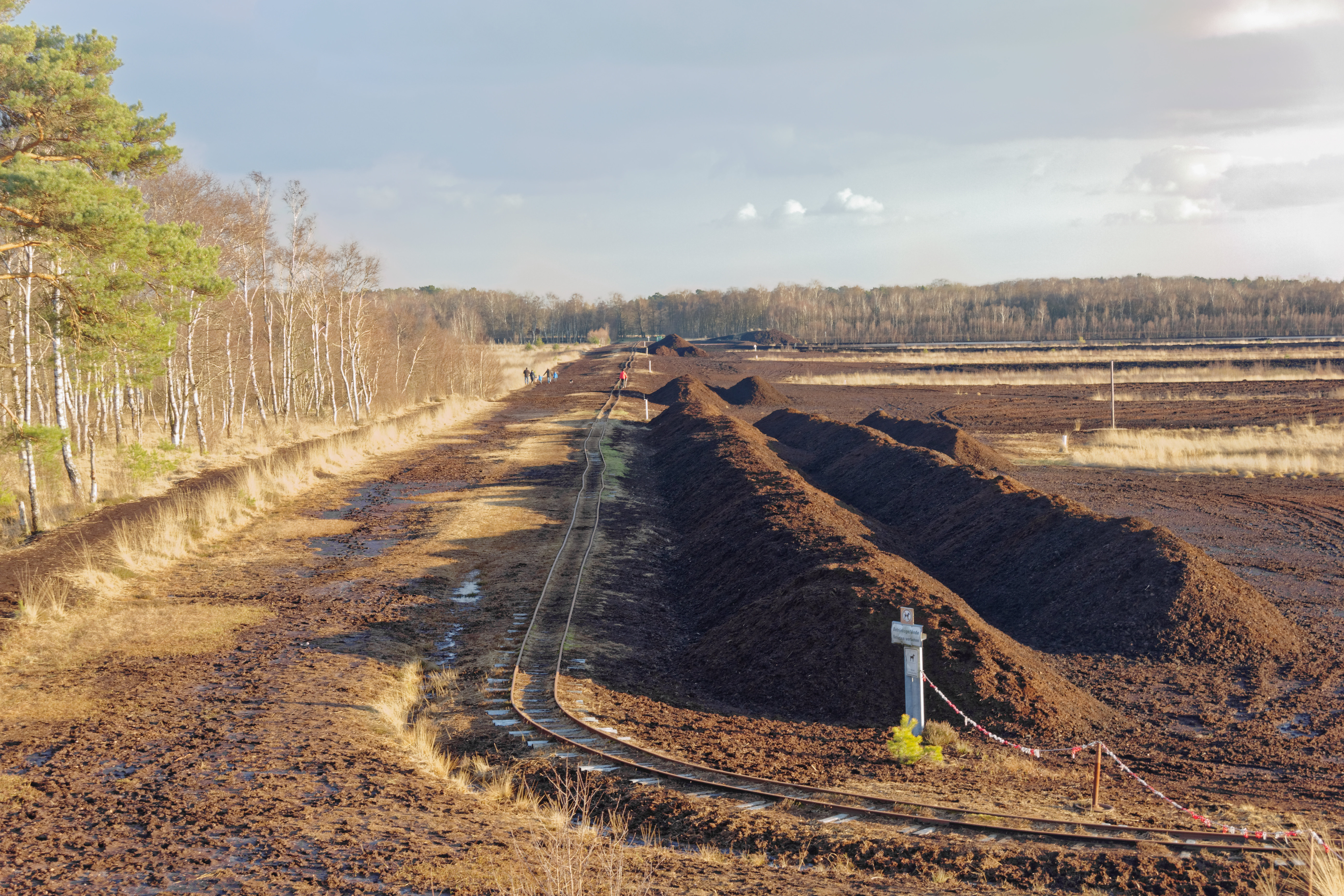 Quickborn, Torfbahn Himmelmoor, Oststrecke